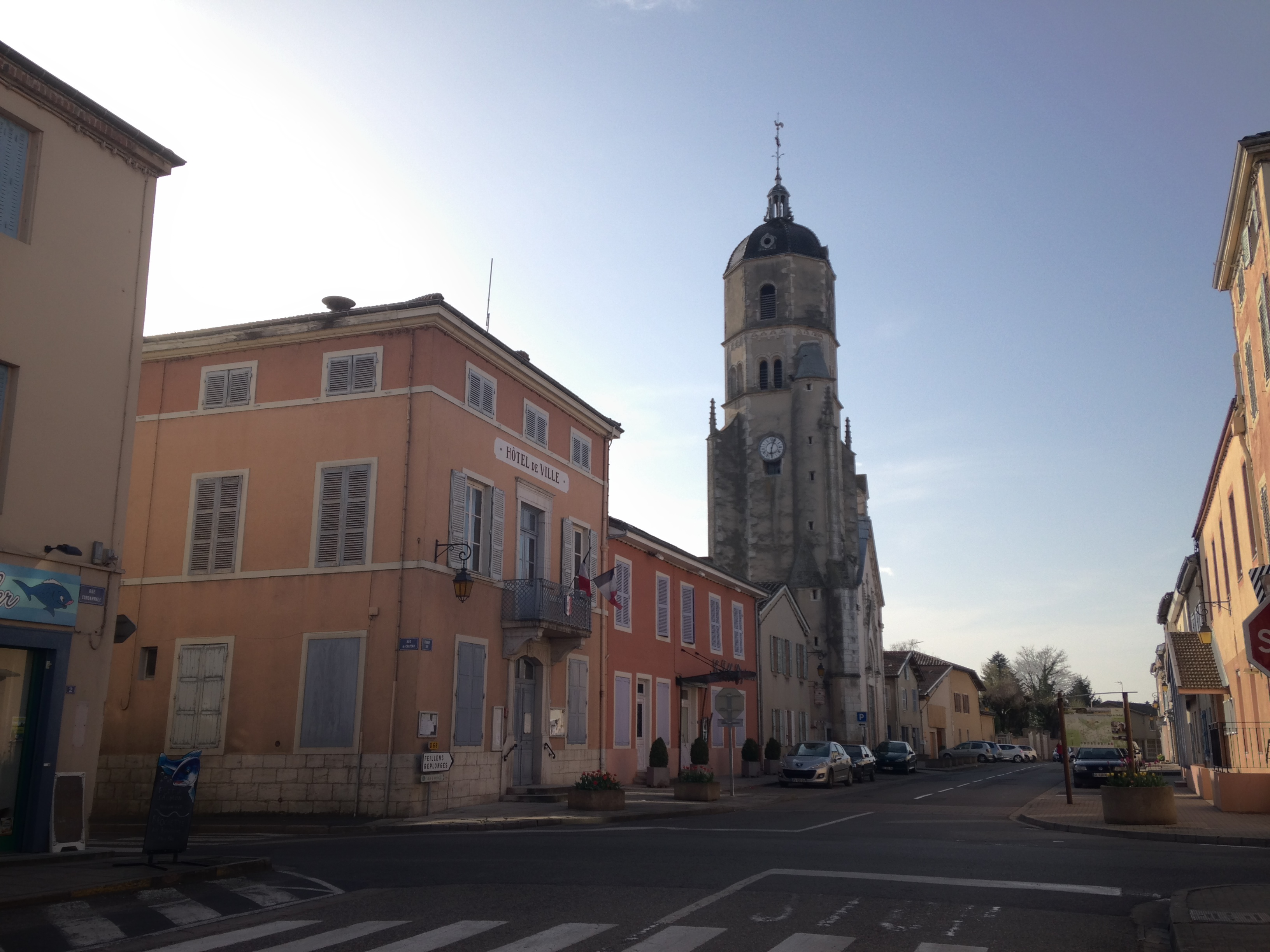 Grande rue de Bâgé-le-Châtel avec l'hôtel de ville et l'église